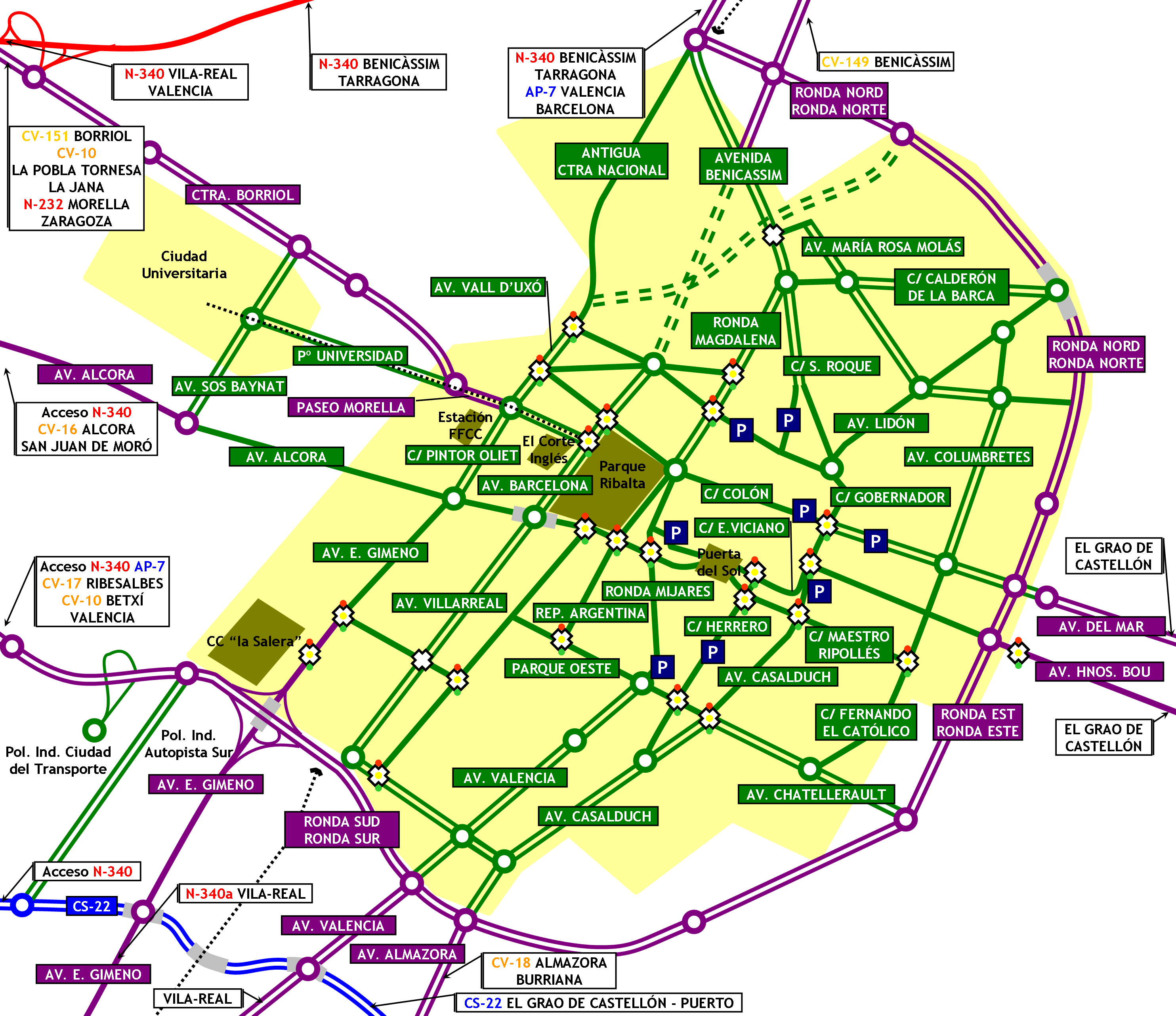 Mapa de avenidas de la ciudad de Castellón de la Plana (España)